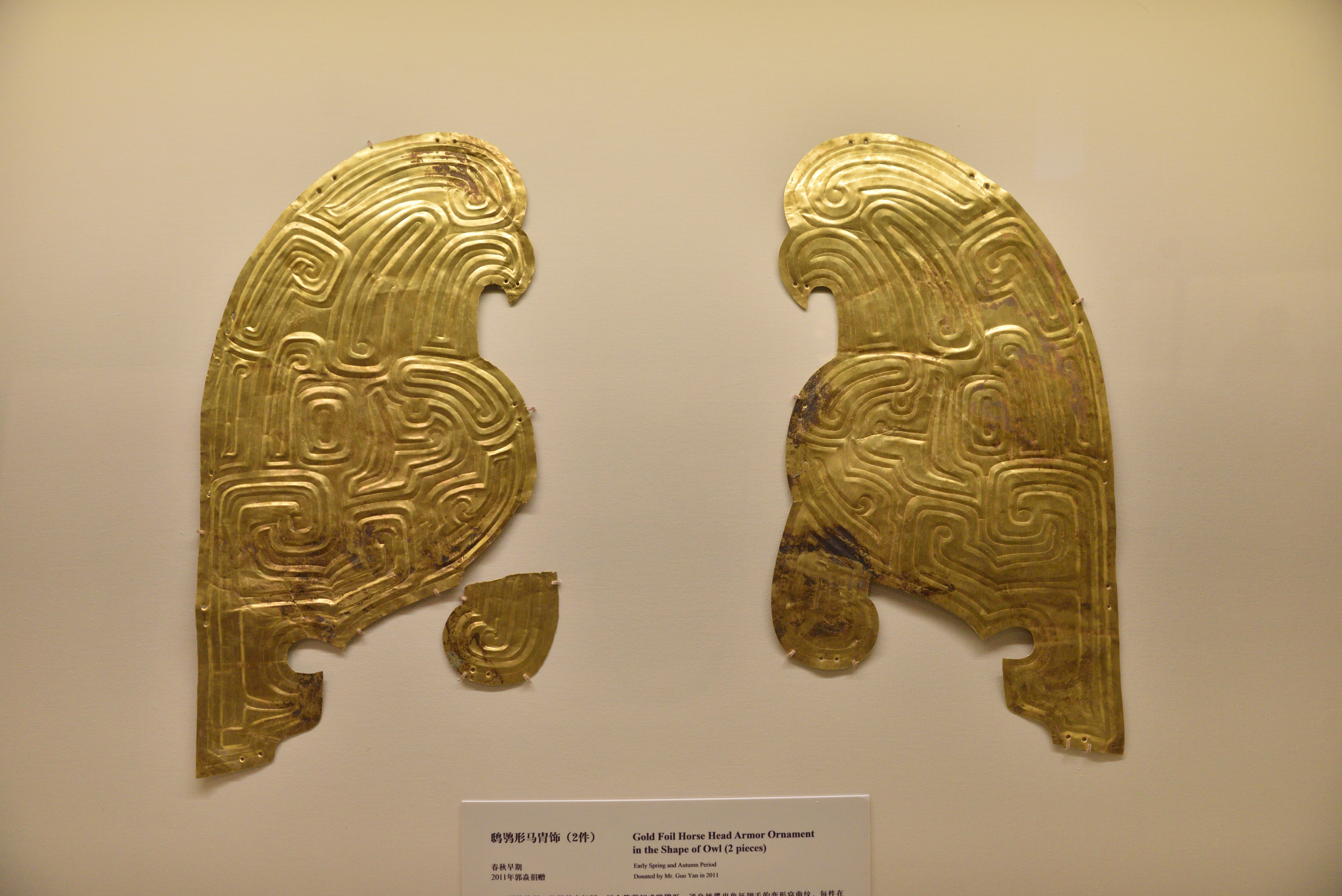 春秋早期鸱鸮形马胄饰（2件）